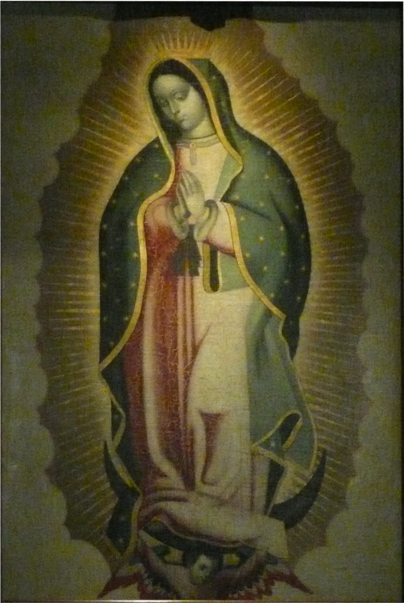 Recorte fotográfico y reencuadre del Segundo Estandarte de Hidalgo y su montura de madera, de los dos estandartes que se usaron por las fuerzas insurgentes al principio de la Guerra de Independencia, este es el menos reconocido como tal, se cree por testimonios que este fue el que tomaron Hidalgo y Allende en Atotonilco, estuvo en resguardo en la Nacional e Insigne basílica de Nuestra Señora de Guadalupe durante casi todo el siglo XIX, en ese momento fue resguardado en una montura vertical de madera. se encuentra exhibido en forma permanente, dentro de su montura de madera en la sala de banderas del Museo Nacional de Historia en el Castillo de Chapultepec. México, D.F.